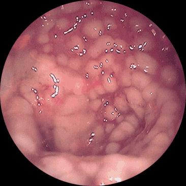 Beschreibung: Pseudomembranöse Colitis Quelle: Selbst fotografiert Fotograf: Bijan Zendeh, Güstrow, 2004 Andere Versionen: (für die GNU FDL)